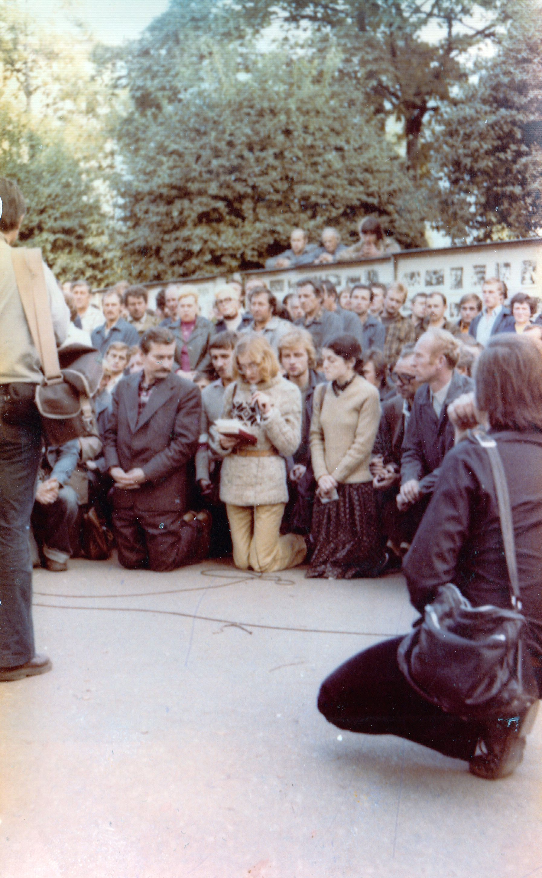 Lech Walesa beim Streik im September 1980